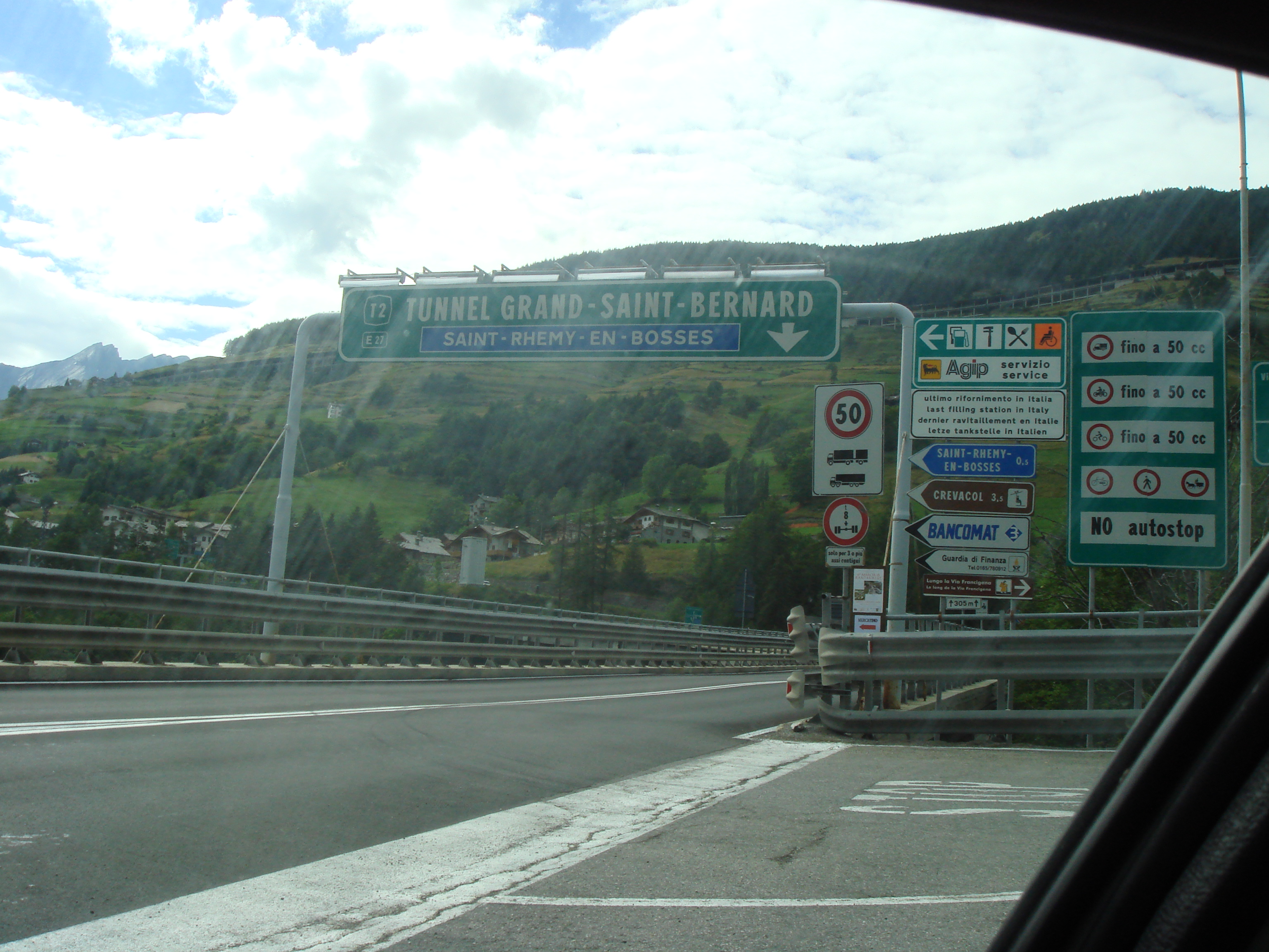 Route européenne 27 à proximité du tunnel du Grand Saint-Bernard